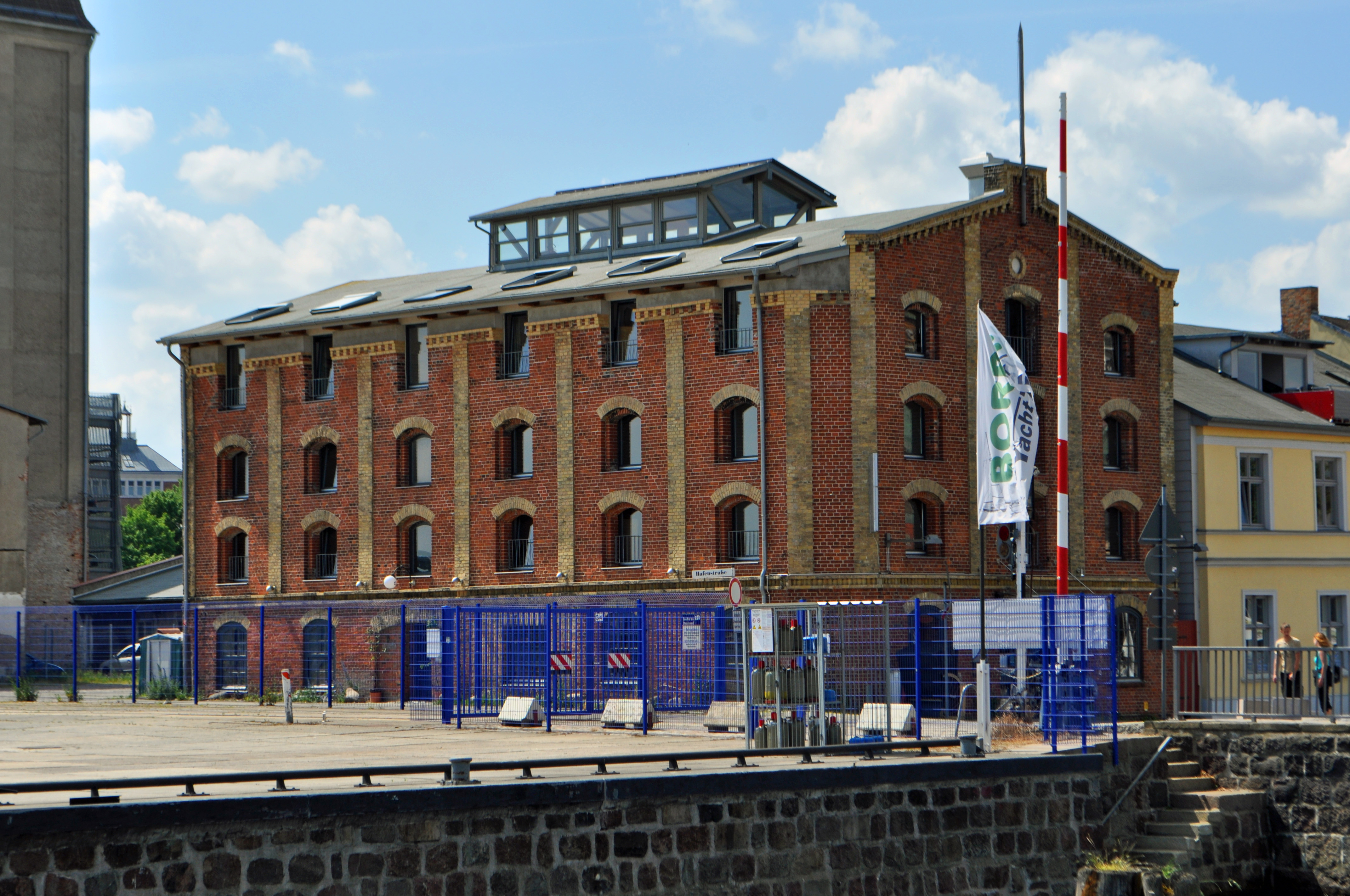 Hafenstraße 13, Speicher.